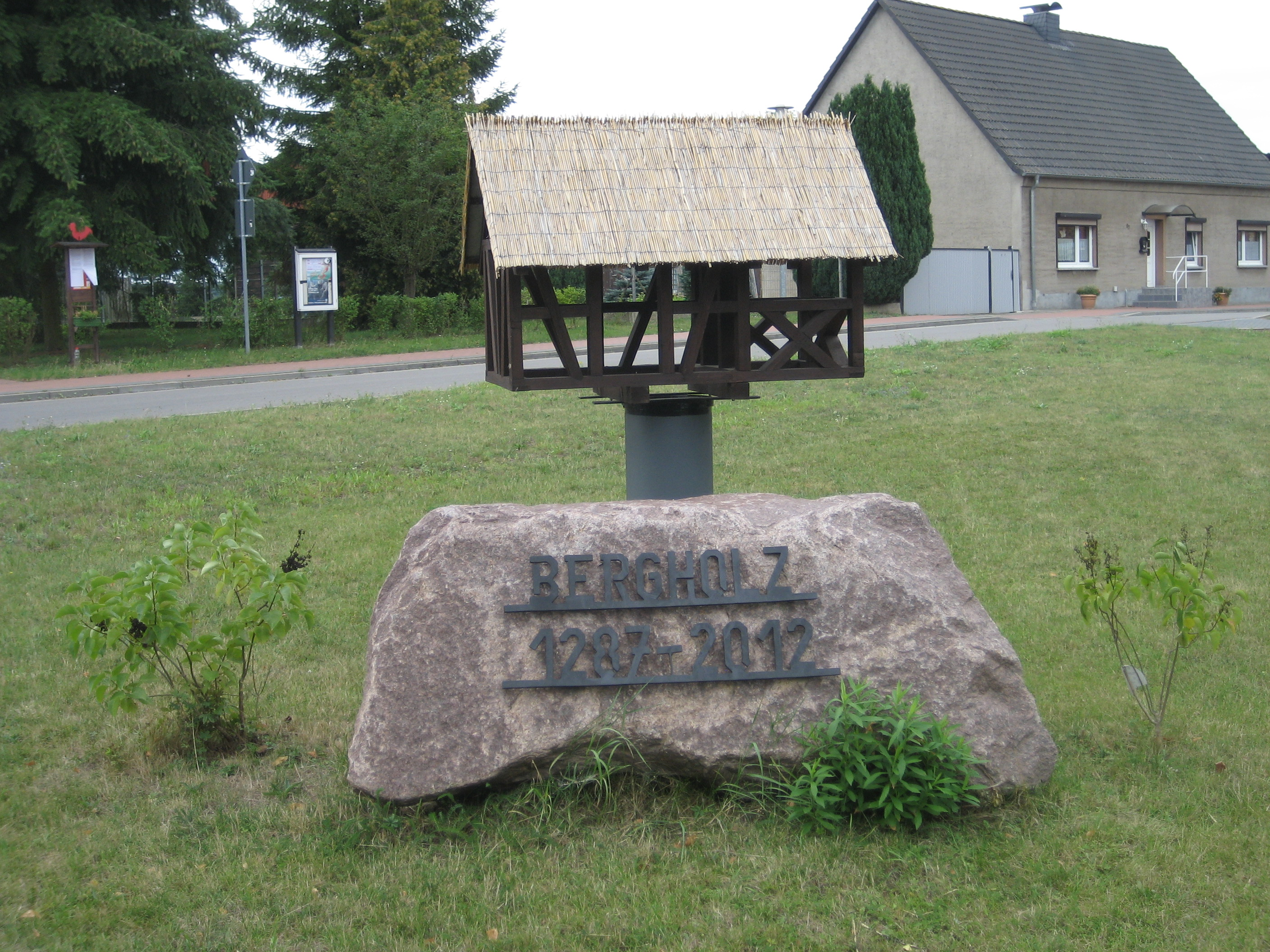 Gedenkstein zu 725 Jahre Bergholz (1287-2012).